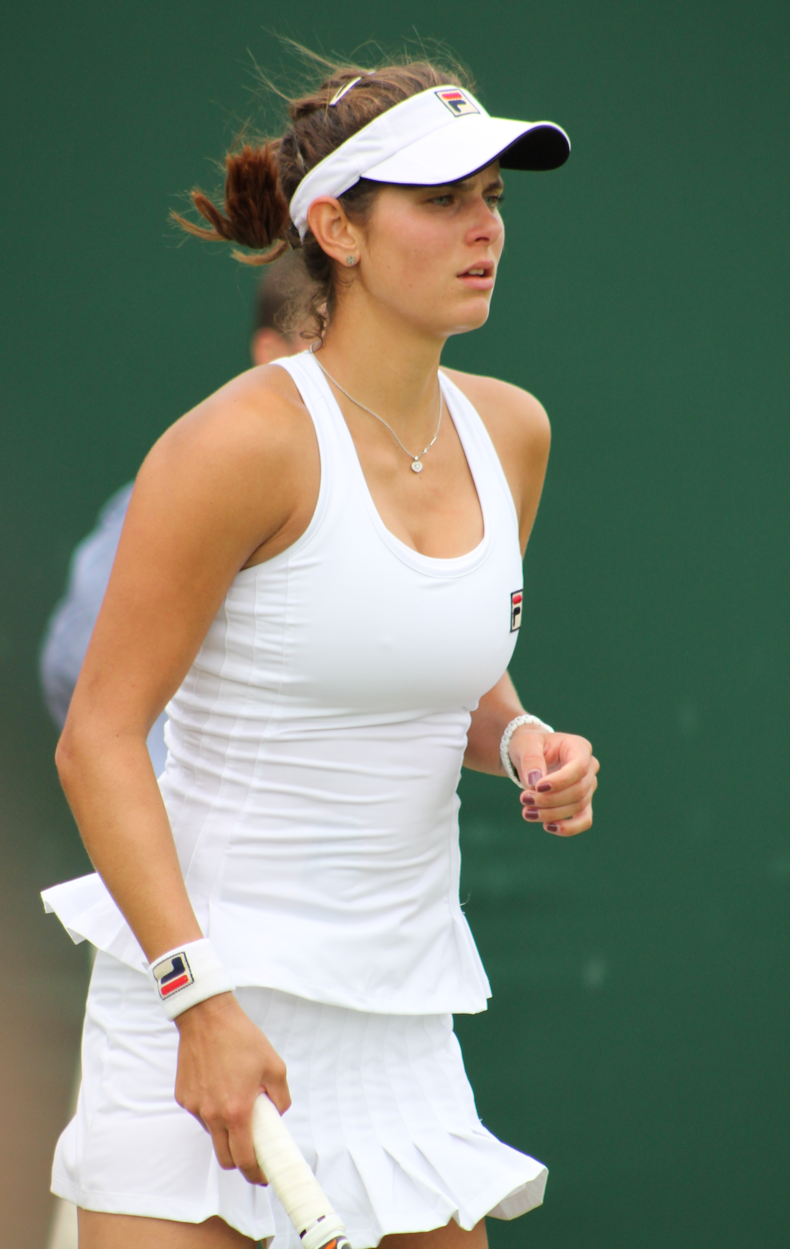 Goerges WM14 (12)